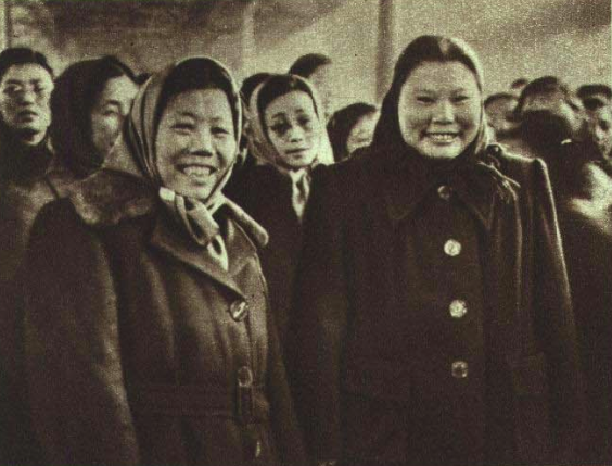 1952年中国代表团出席4月国际保卫儿童大会 右为康克清团长 左为邓颖超